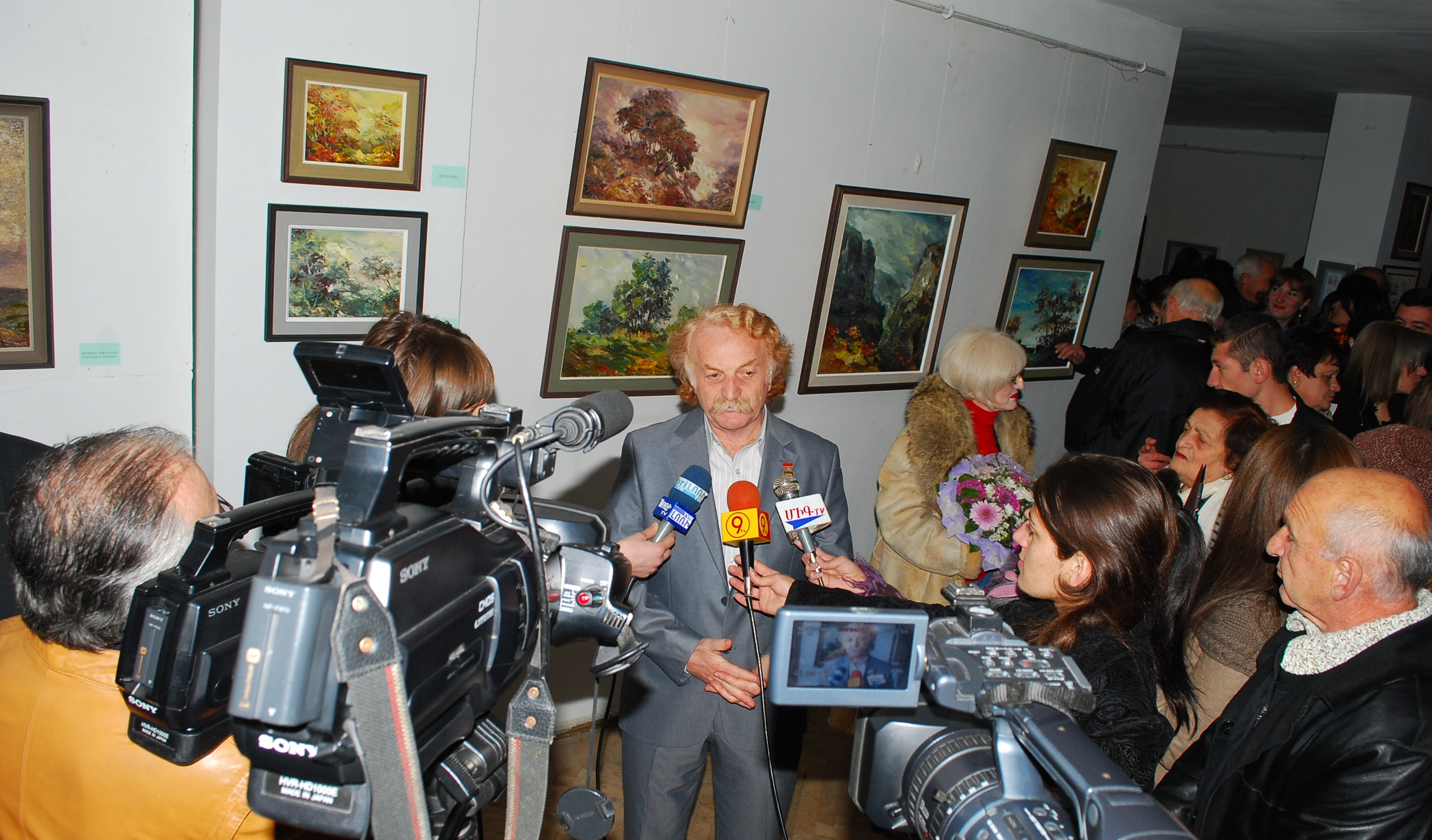 ԱԼՓԱ 2011, հարցազրույց